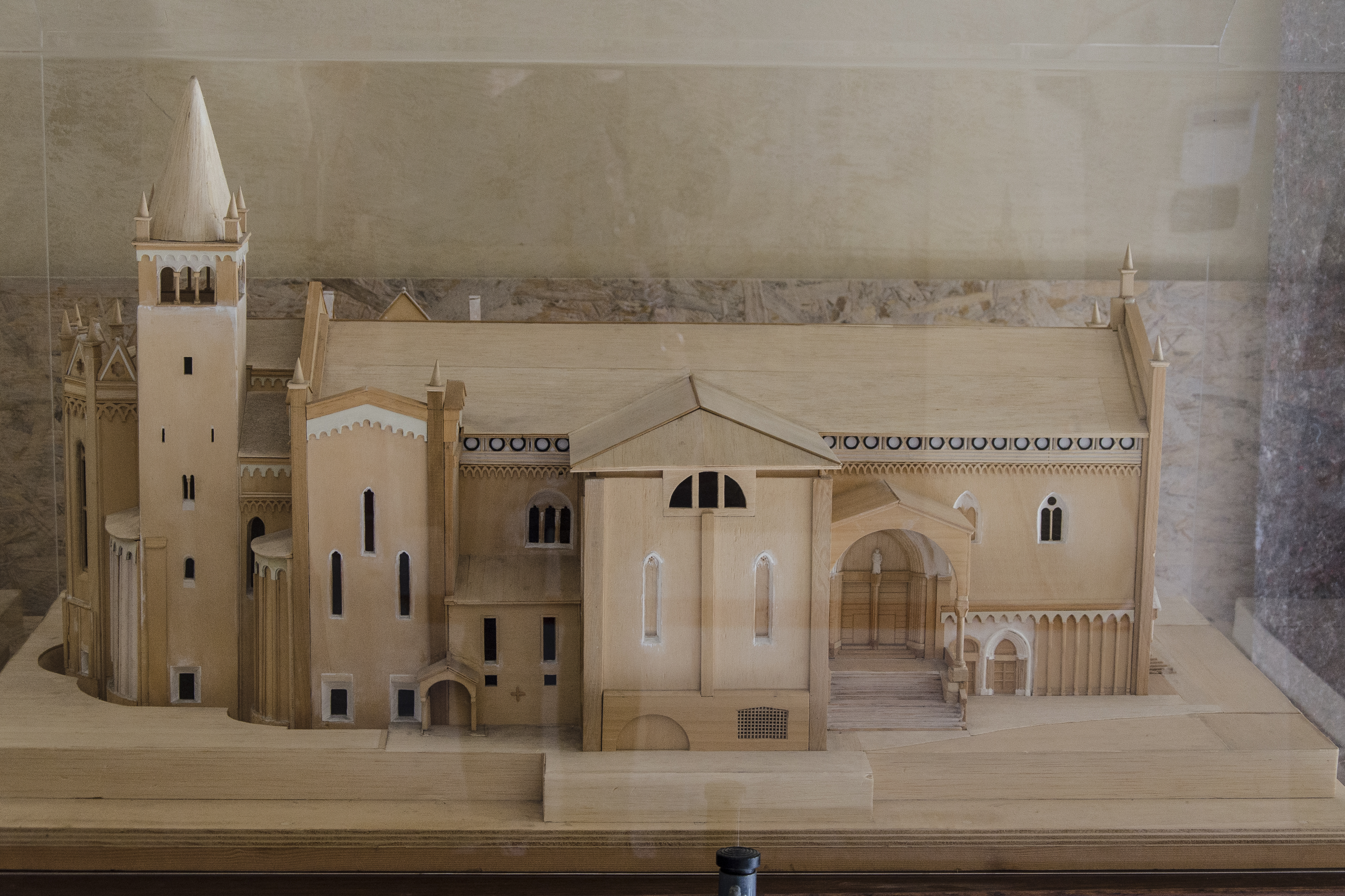 Modello della chiesa - terza fase. Modello realizzato da Paolo Borsato